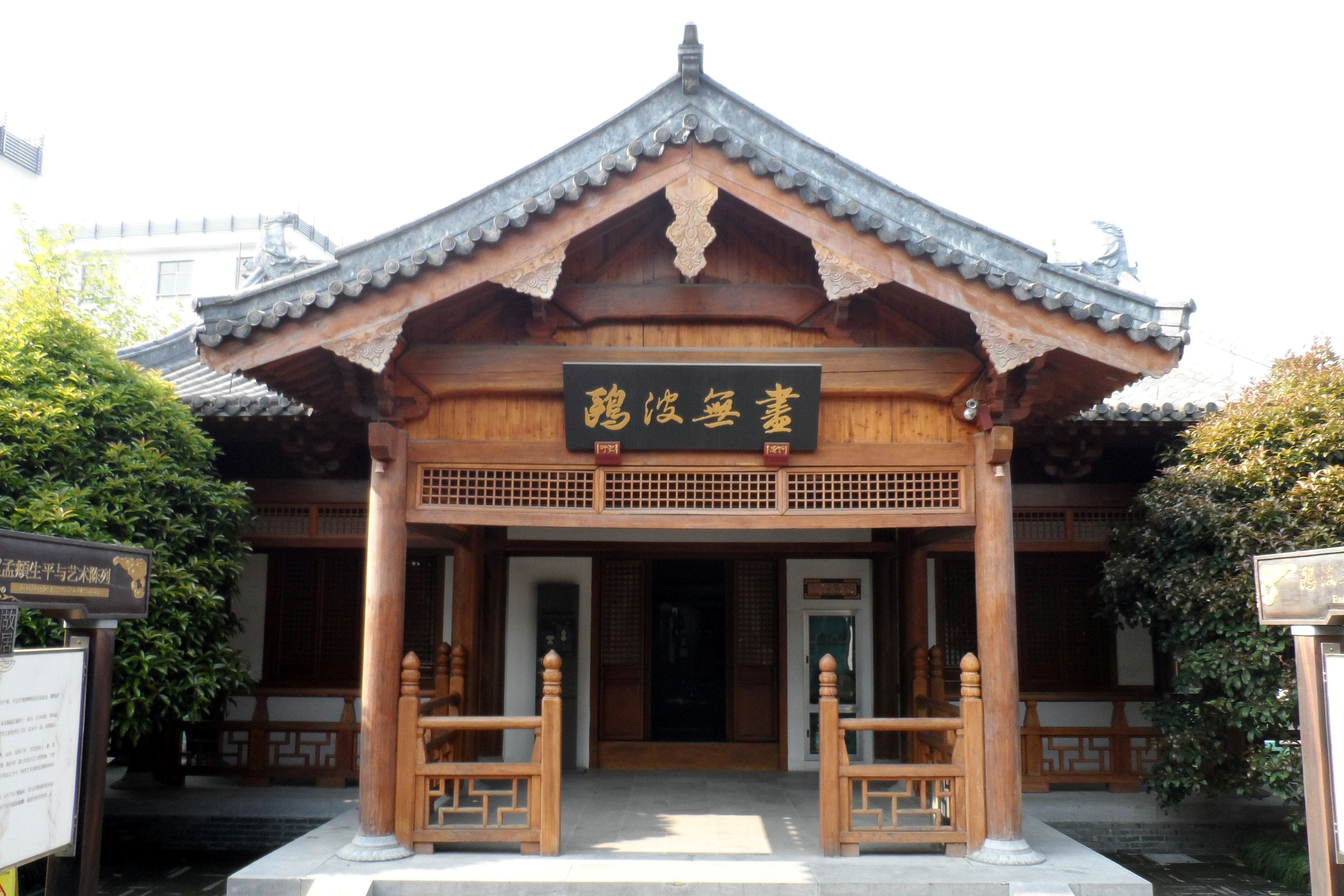 趙孟頫故居舊址紀念館內景